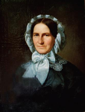 Frau Professor Wilhelmine Suhrlandt Unbezeichnet